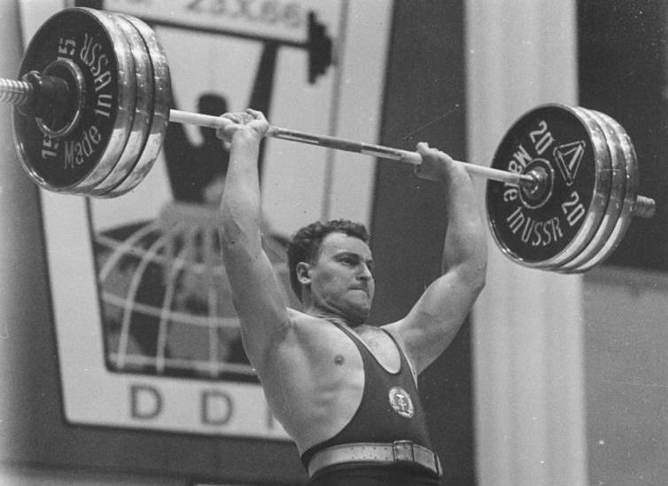 Wittenberg, Manfred Rieger Zentralbild Wendorf Sche 05.11.1967 Wittenberg: Deutsche Meisterschaften der DDR im Gewichtheben (04.11.1967) Manfred Rieger mit neuem DDR-Rekord. Neuer deutscher Schwergewichtsmeister der DDR im Gewichtheben wurde der 26 Jahre alte Zittauer Manfred Rieger (unser Archivfoto) , der sich den Titel im olympischen Dreikampf mit dem neuen deutschen Rekordergebnis von 520 kg (175-150-195) erkämpfte. Damit übertraf er seine alte Bestleistung gleich um 15 kg. Manfred Rieger wartete mit einer phantastischen Rekordserie auf. Im beidarmigen Drücken übertraf er den alten Rekord von Arnold (166 kg) mit 171, 175 und176 kg gleich dreimal, und auch im beidarmigen Reißen schaffte er mit 148,5 und danach 150 und 151 kg neue Rekorde (hier hielt er selber den Rekord mit 147,5 kg) . Und schließlich verbesserte Rieger im beidarmigen Stoßen seine alte DDR-Bestleistung von 195 auf 196,5 kg. Außer Konkurrenz brachte er in dieser Disziplin als erster DDR-Heber sogar 200 kg zur Hochstrecke.